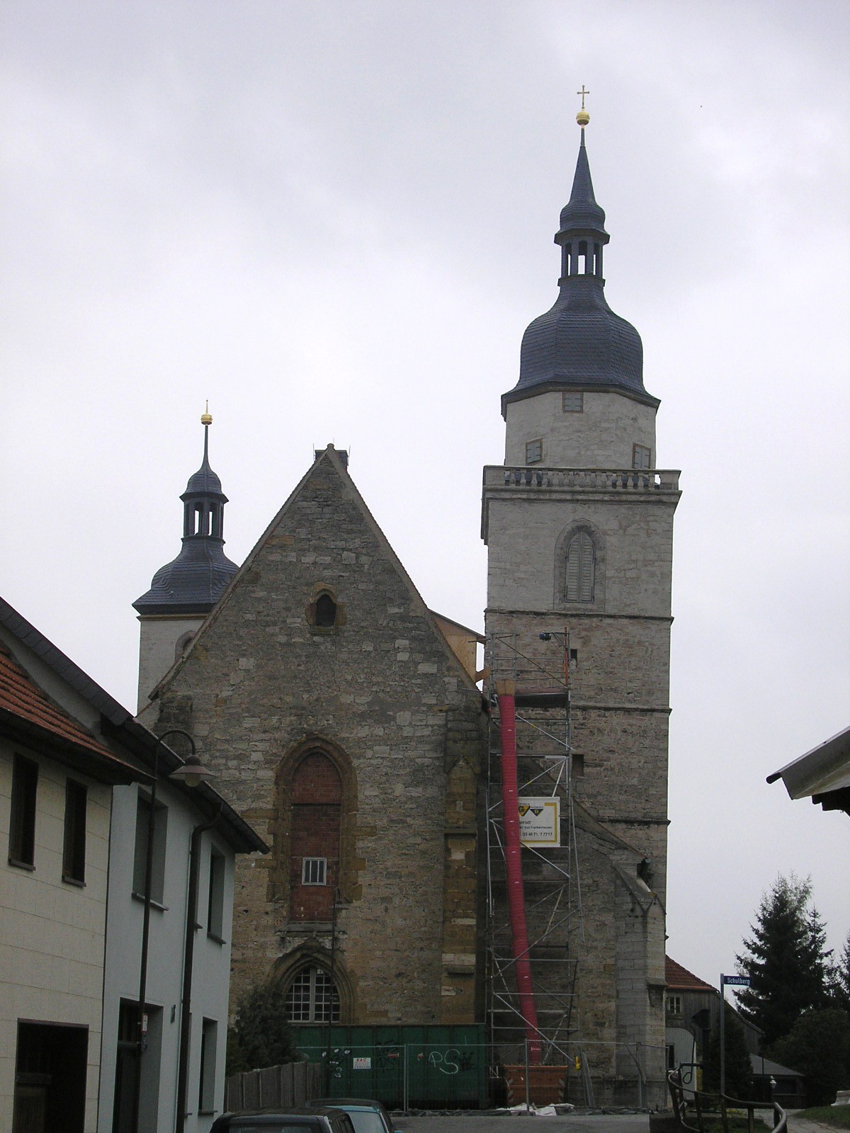 Westansicht der Stadtkirche in Bad Tennstedt (Thüringen).